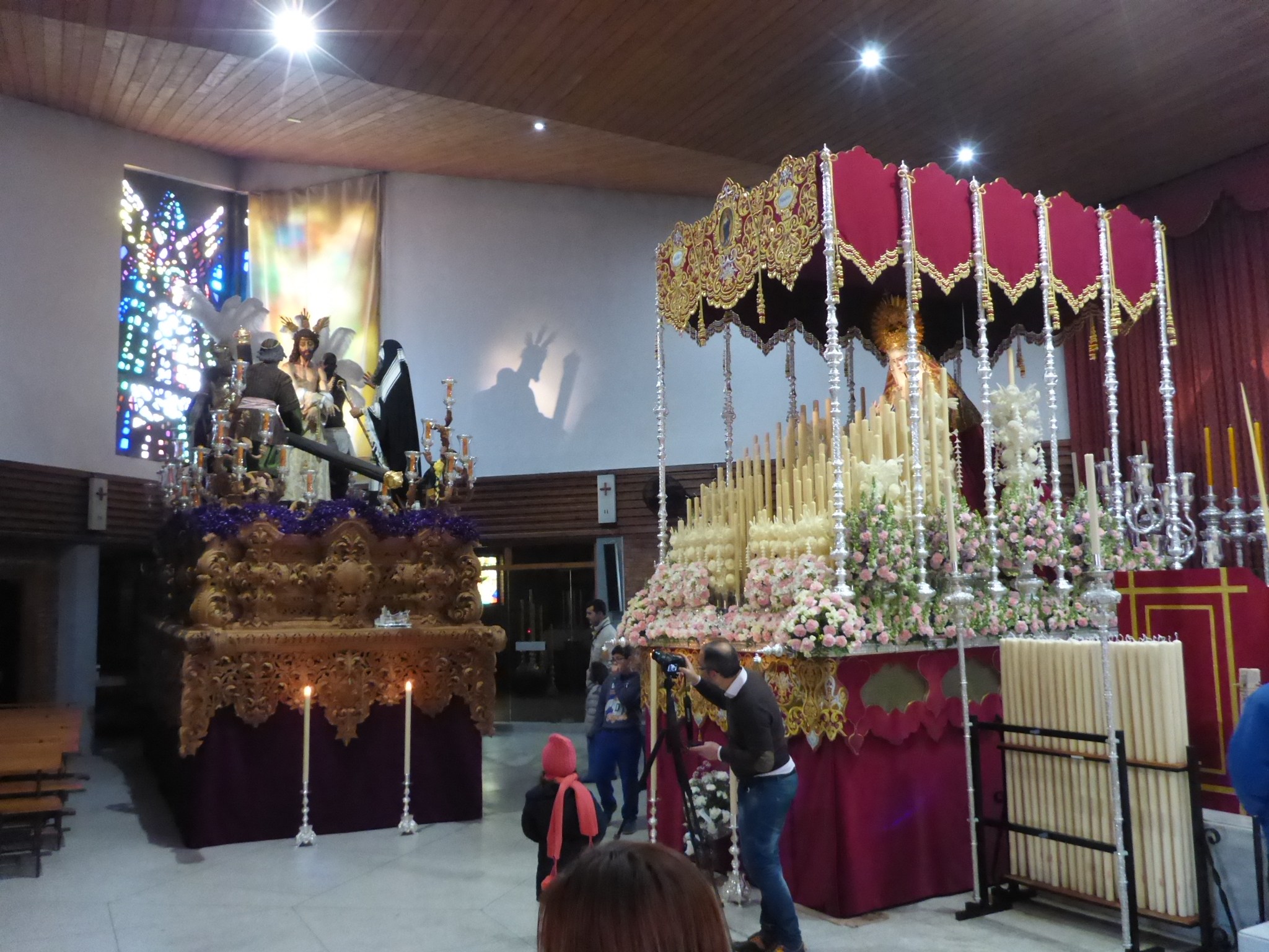 Pasos de la Hermandad de la Paz de Fátima en Jerez (Andalucía, España)